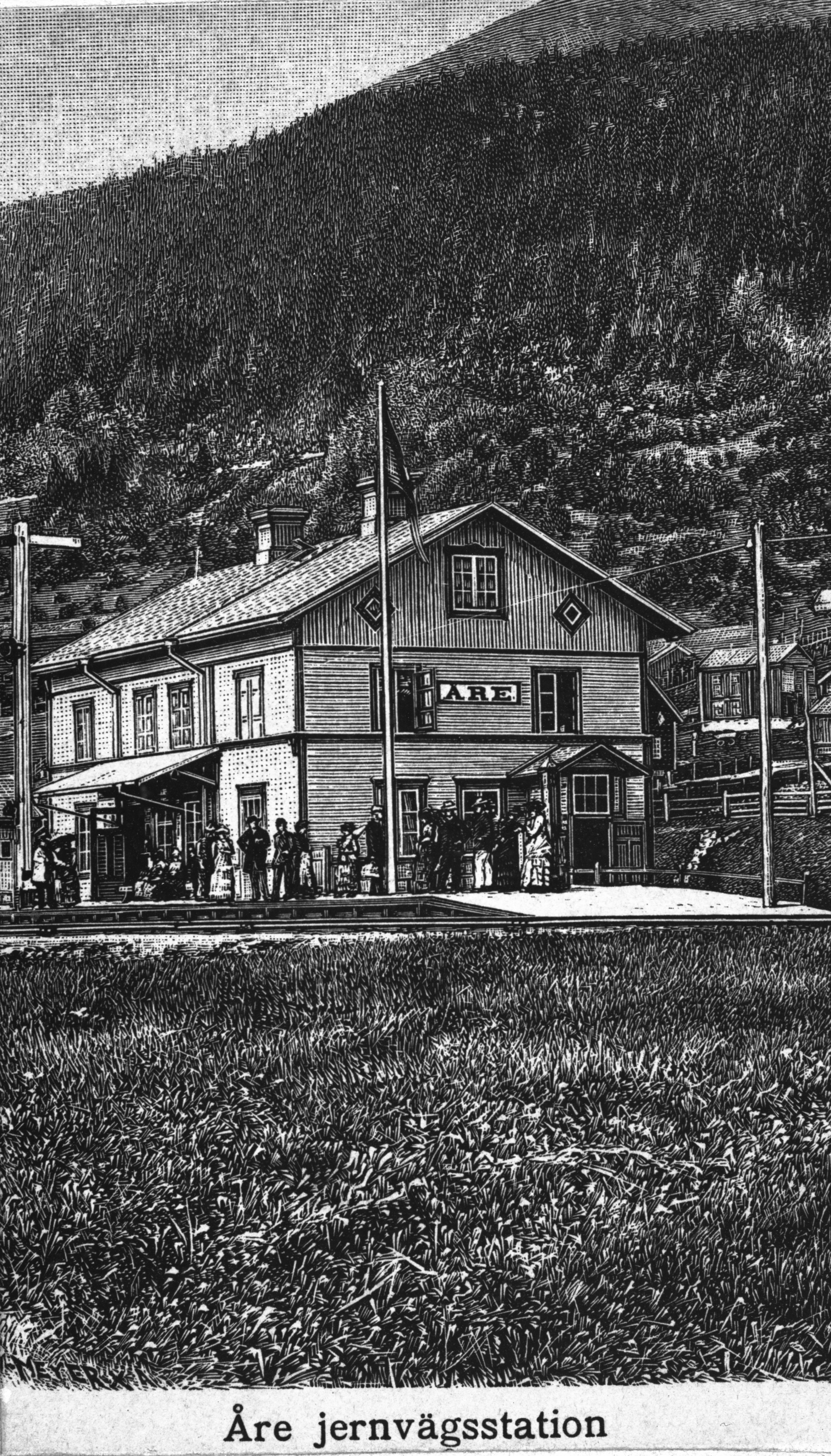 Station anlagd 1881. Tvåvånings stationshus i trä. Arkitekten var Edelsvärd. Mekanisk växelförregling.1943 moderniserades expeditionslokalerna, tillbyggdes bagageutrymme och inreddes byggnaden med moderna bekvämligheter. Stationshus K-märkt 1986. Lavering av Meyer "Åre Station vid foten av Åreskutan", 1882